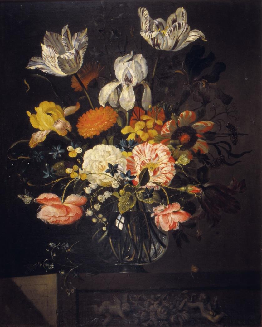 Florero